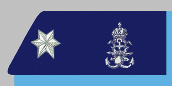 Gefreiter als Truppenpionier eines k.u.k. Infanterieregiments